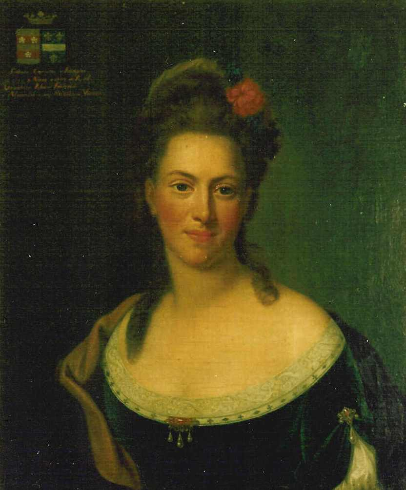 Friederike von Alvensleben, geb. von Klinglin